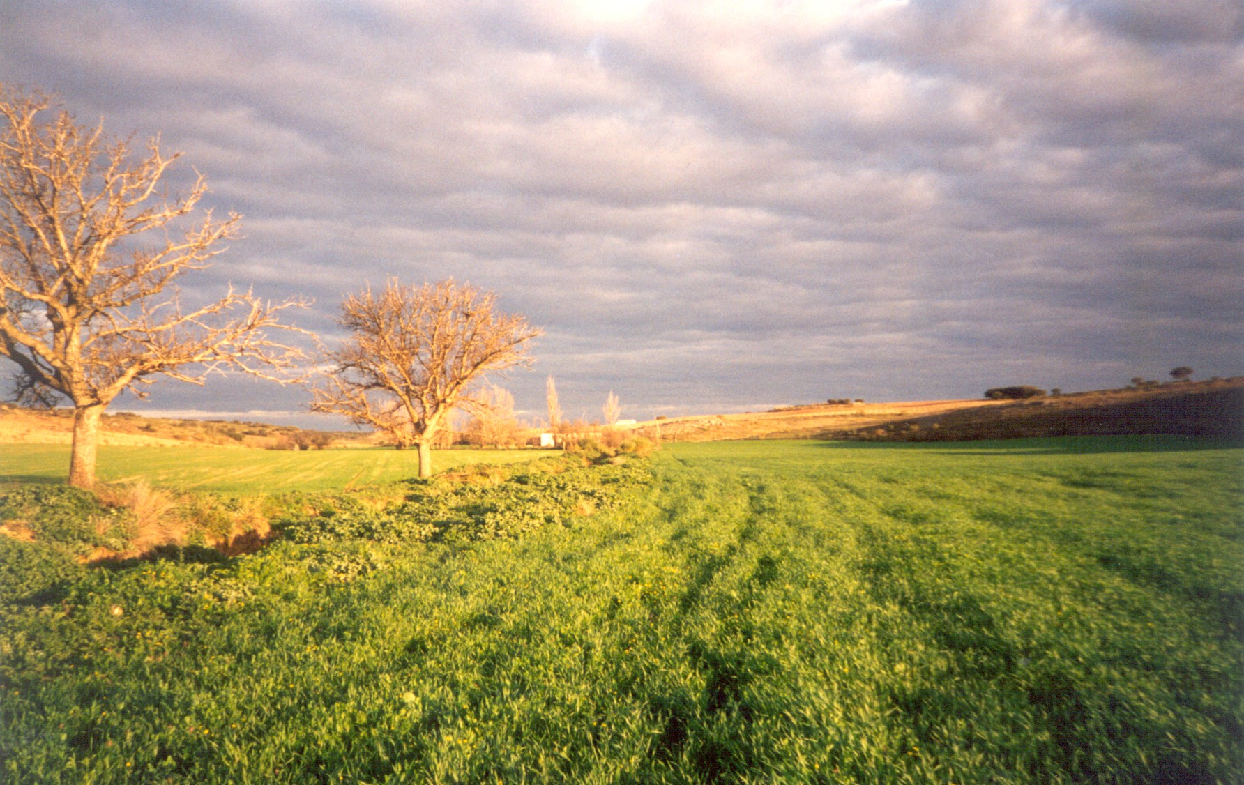 Vista de la ribera del río CÓrcoles (desde la margen izquierda), hacia el Molino de la Pasadilla